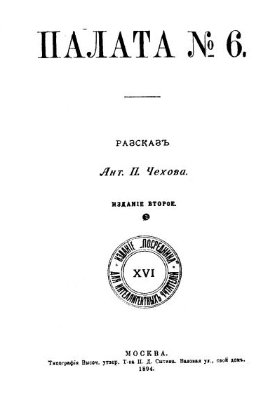 палата номер 6